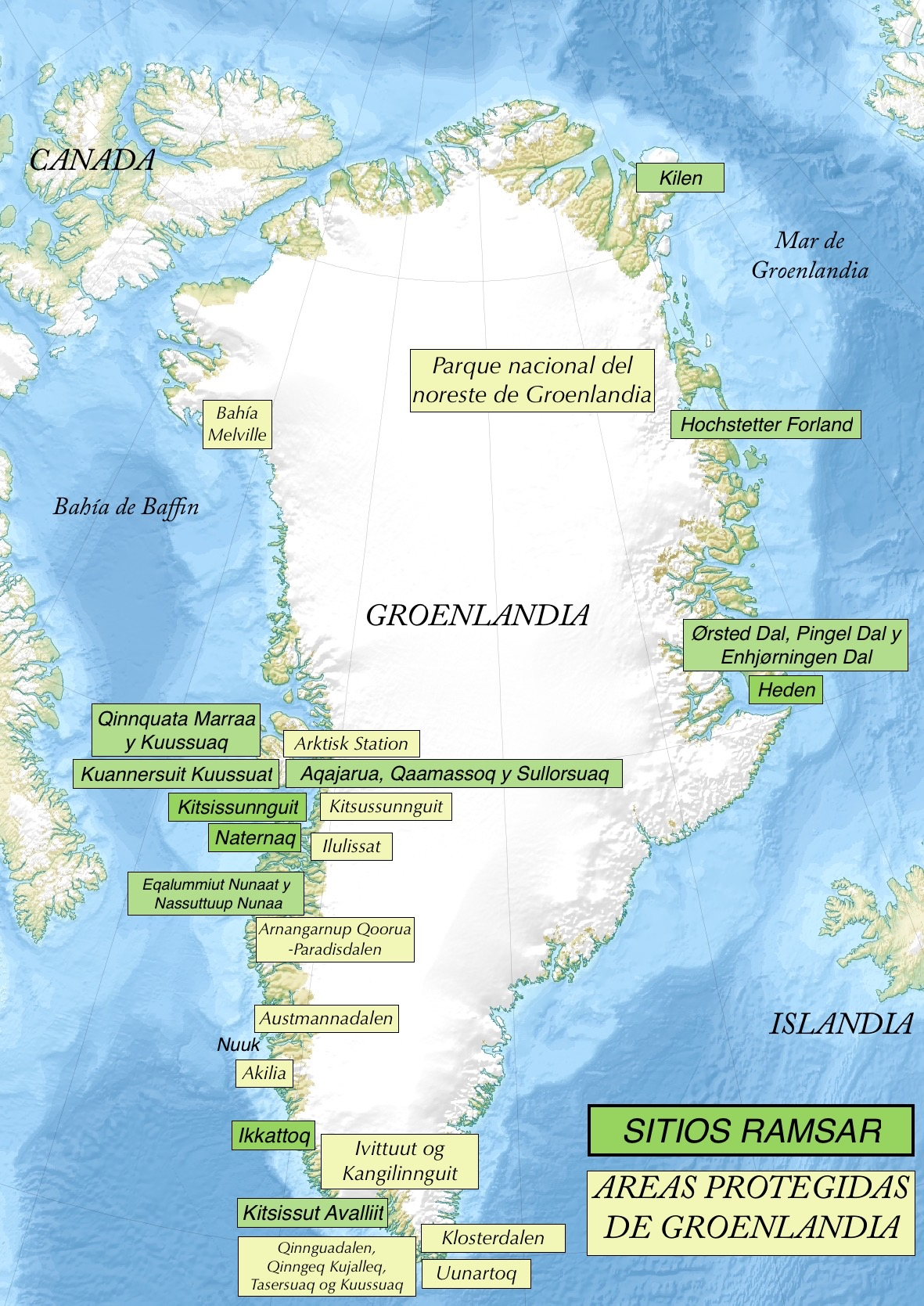 Áreas protegidas y sitios Ramsar de Groenlandia